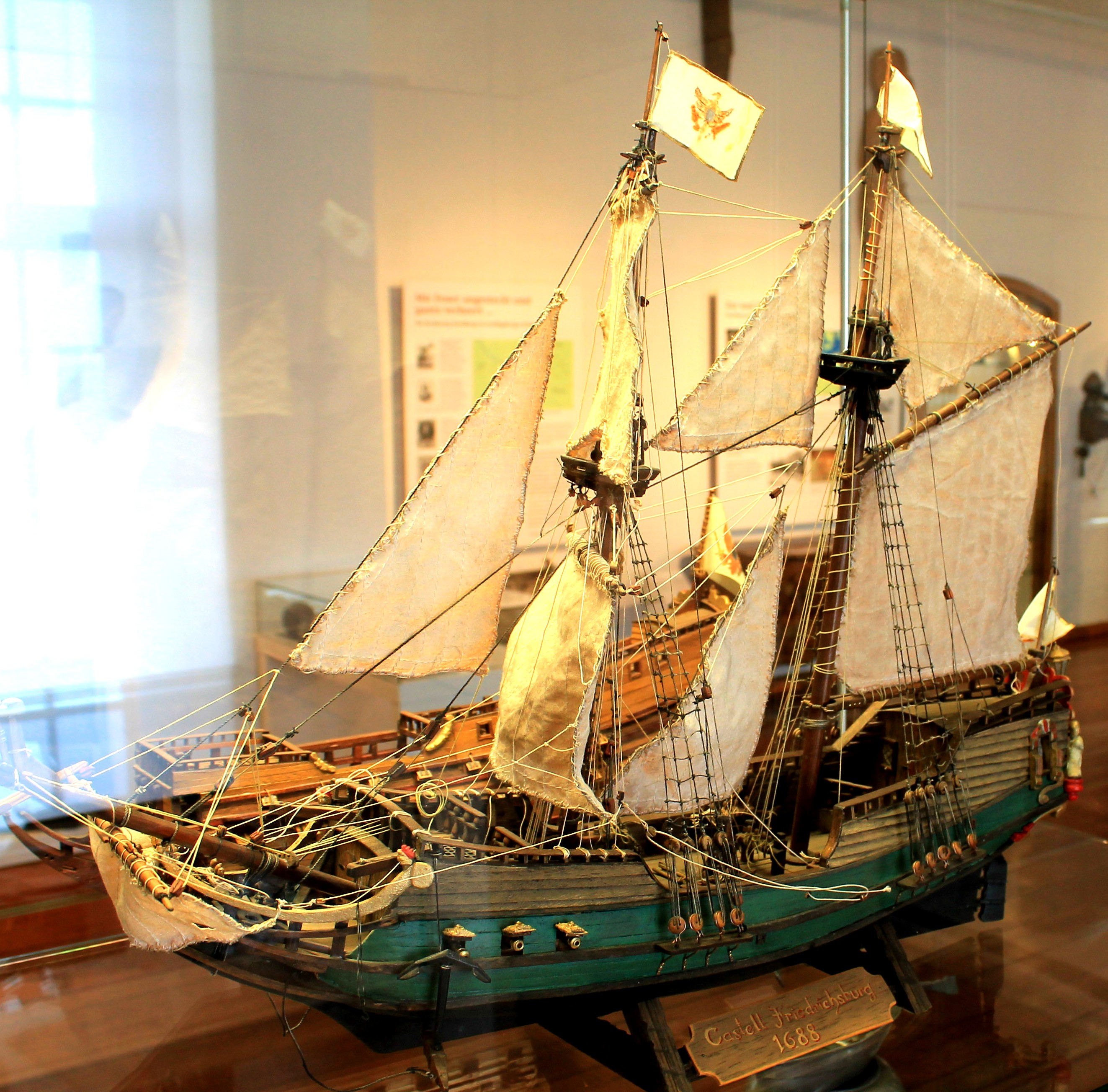 Fragatte Kastell Friedrichsburg